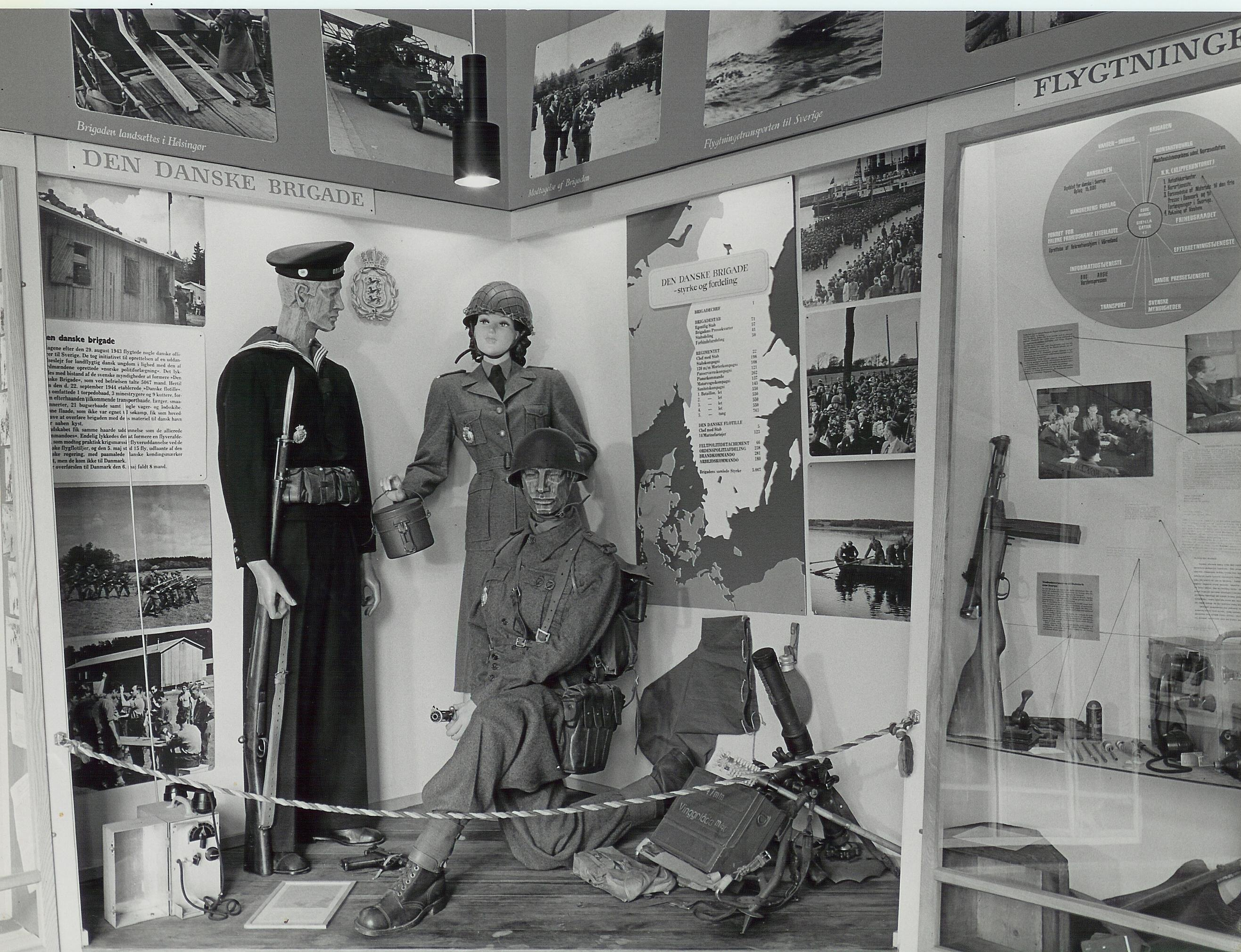 Udstillingsafsnit om Den Danske Brigade i Frihedsmuseets oprindelige udstilling (1957- ) Sted: Frihedsmuseet, København Se flere billeder her: Rights: More about The Museum of Danish Resistance (Frihedsmuseet)